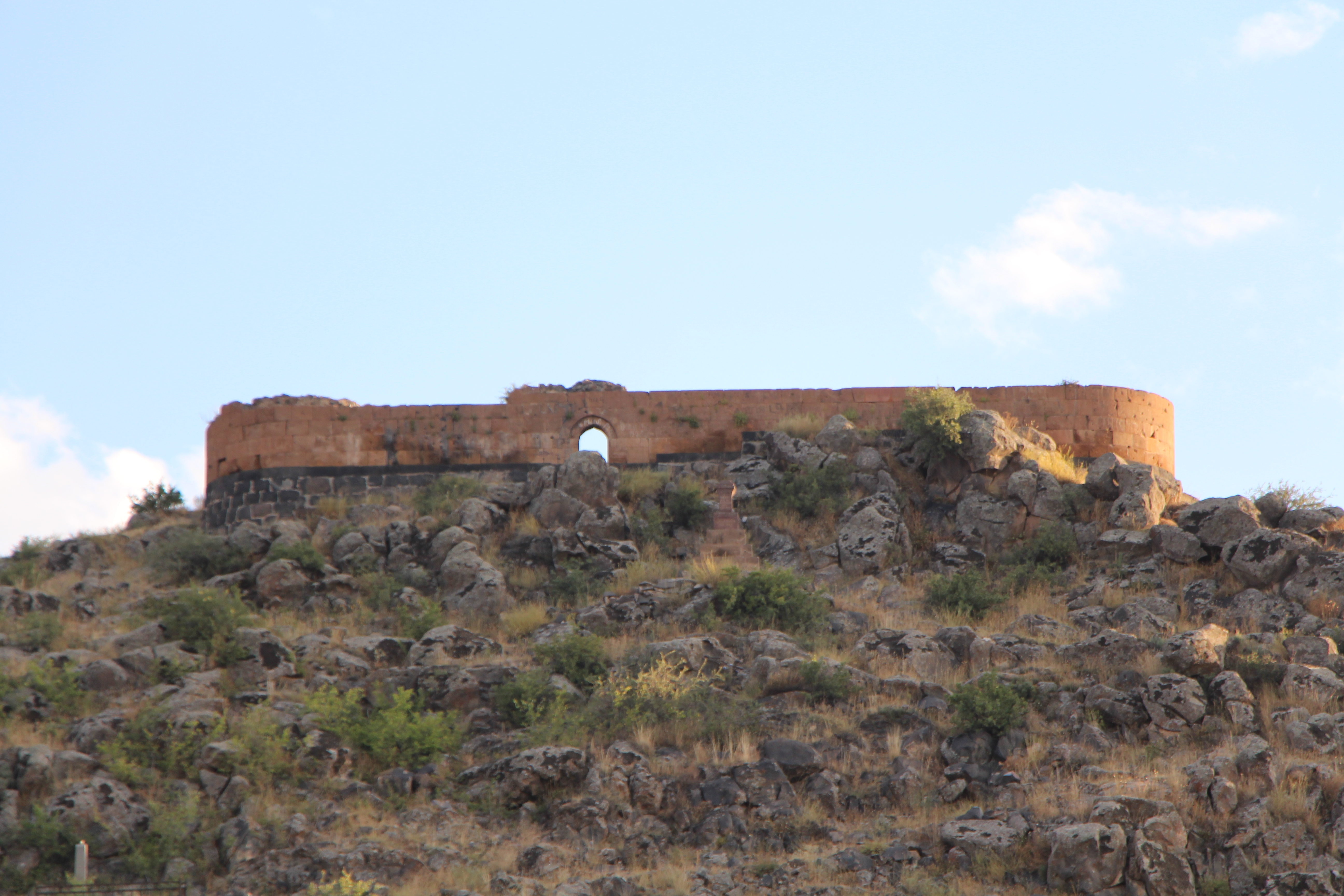 Կոշ, Արագածոտնի մարզ, ամրոց «Աղջկա բերդ» 13-14 դդ. բնակատեղիի հվ-աե կողմում 61/9.1